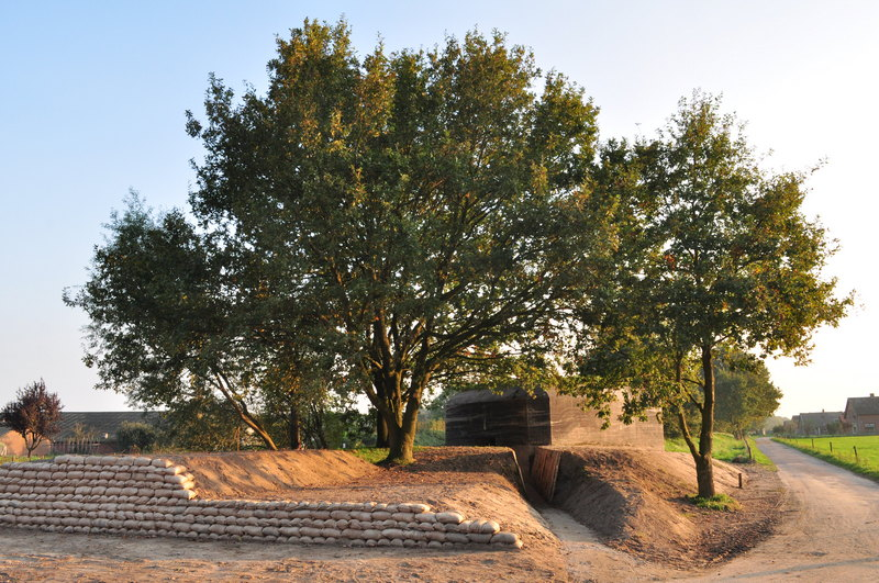 De museumbunker in Leusden, een Duitse gevechtsbunkers van het type 703 voor een 8,8cm geschut.